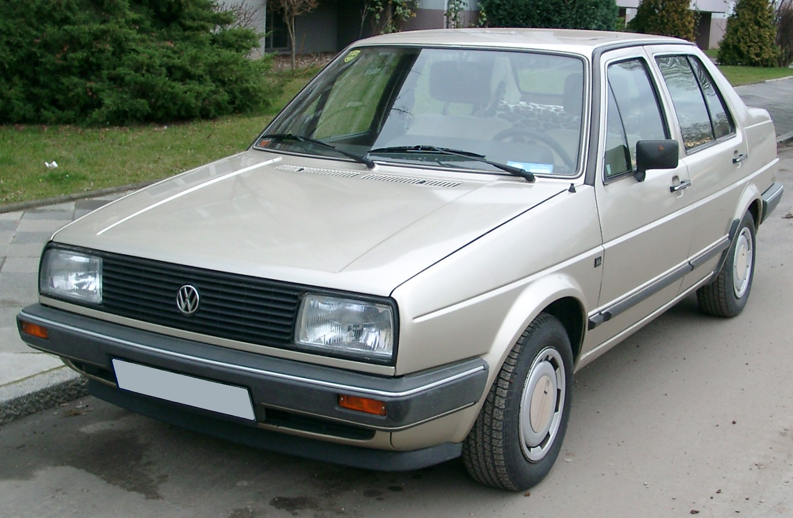 VW Jetta